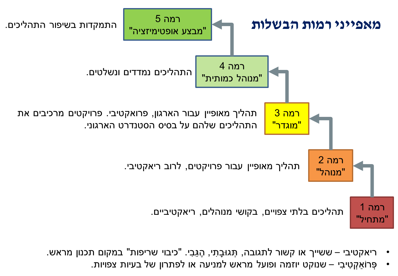 The Hebrew version of the CMMI Maturity Levels diagram on the English CMMI page.